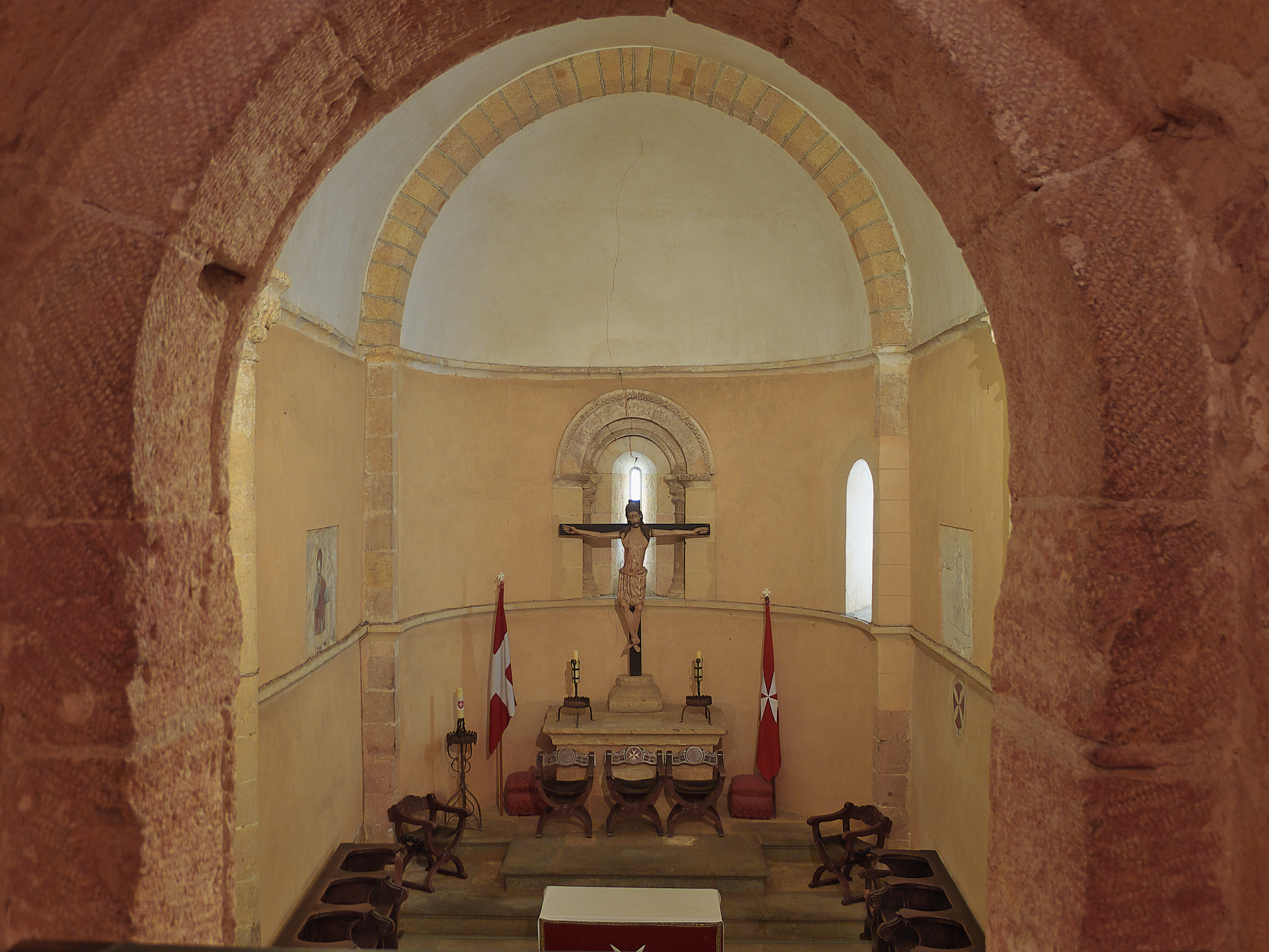 Preside un crucificado del siglo XIII